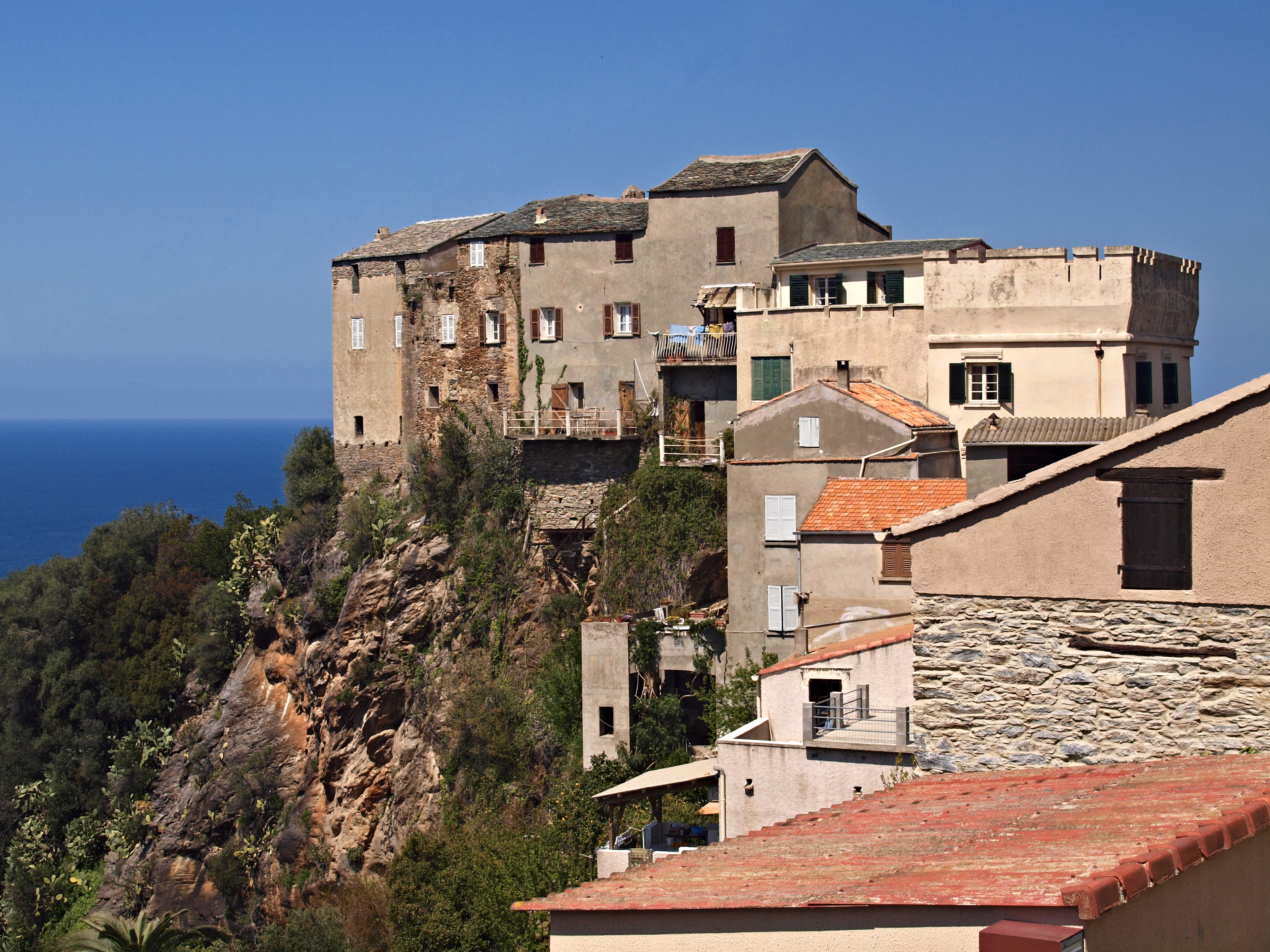 Farinole (Corsica) - Maisons au hameau Sparagaggio